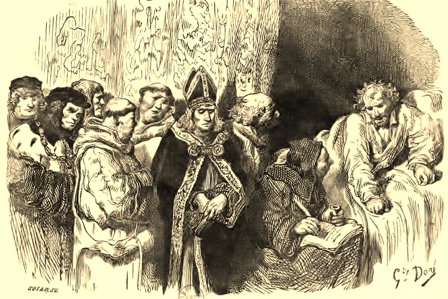 Gravure de Gustave Doré pour l'édition de 1854. Gravure sur bois ; 15,5 x 19 cm.